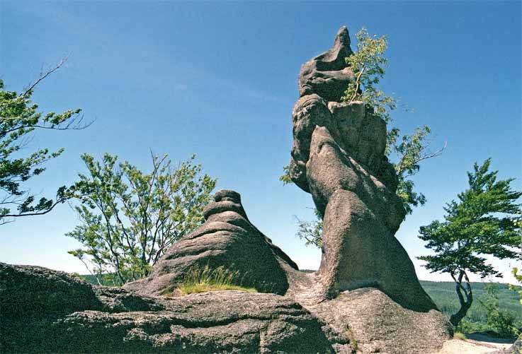 obrázek ze skalního města autor:Zp